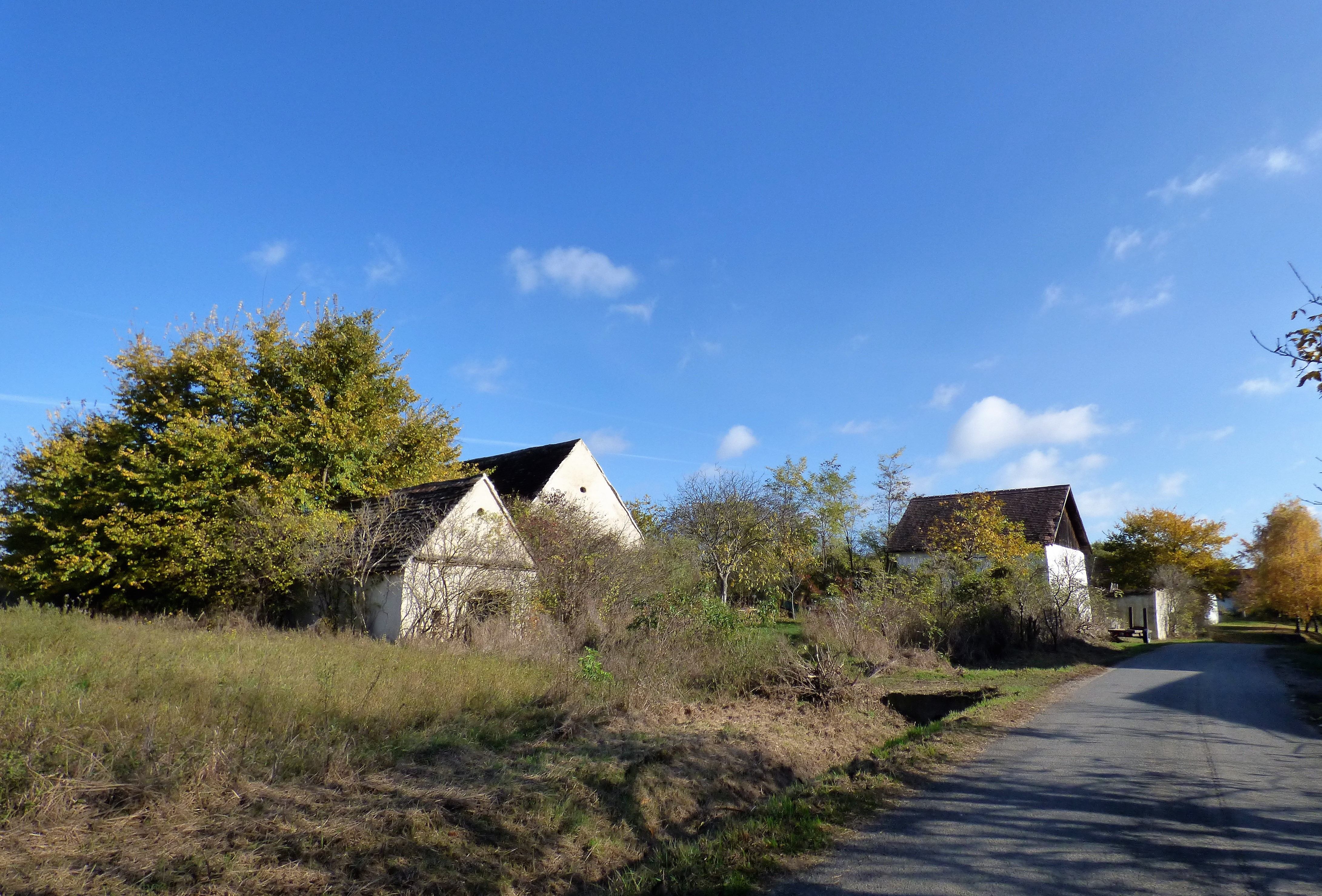 Kellergasse Wartberg (Gemeinde Straning-Grafenberg), nördliches Hintaus